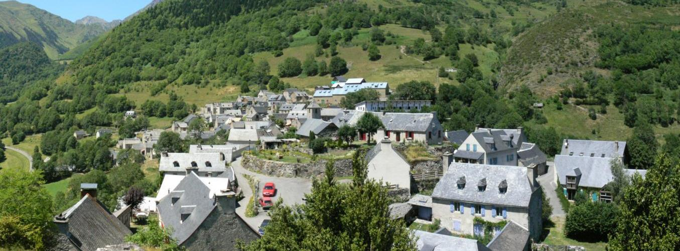 Village d'Aulon dans les Hautes-Pyrénées.